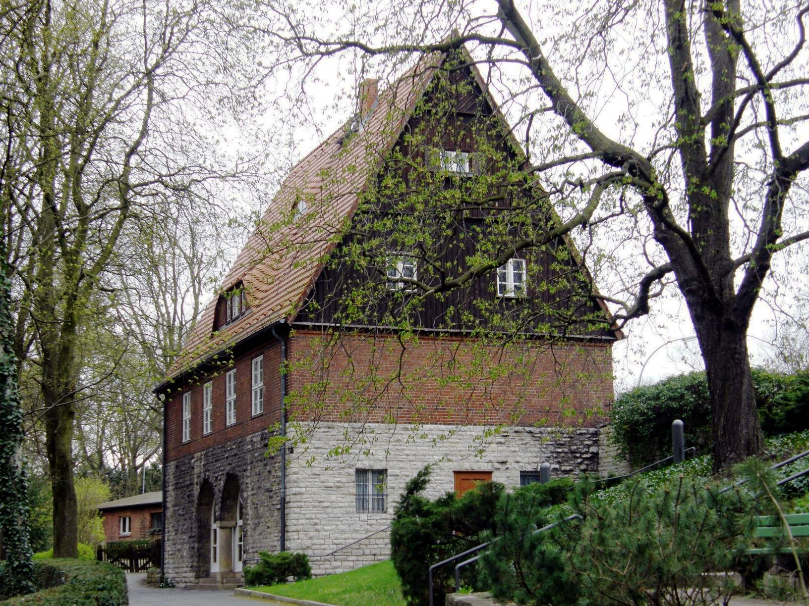 Verwaltungsgebäude des Friedhofs Heerstraße. Trakehner Allee 1, Berlin-Westend.